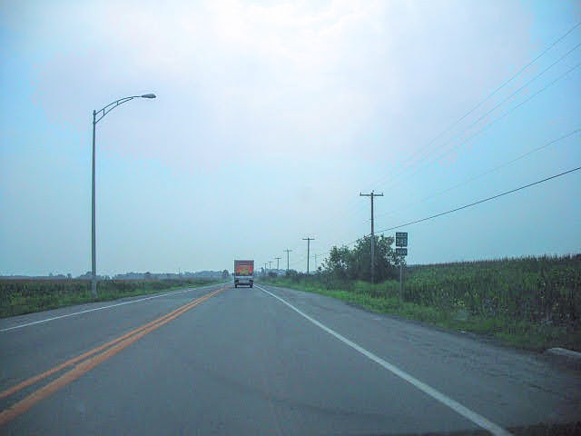 Vue sur la route 343, dans L'Assomption (région de Lanaudière), Québec, Canada.